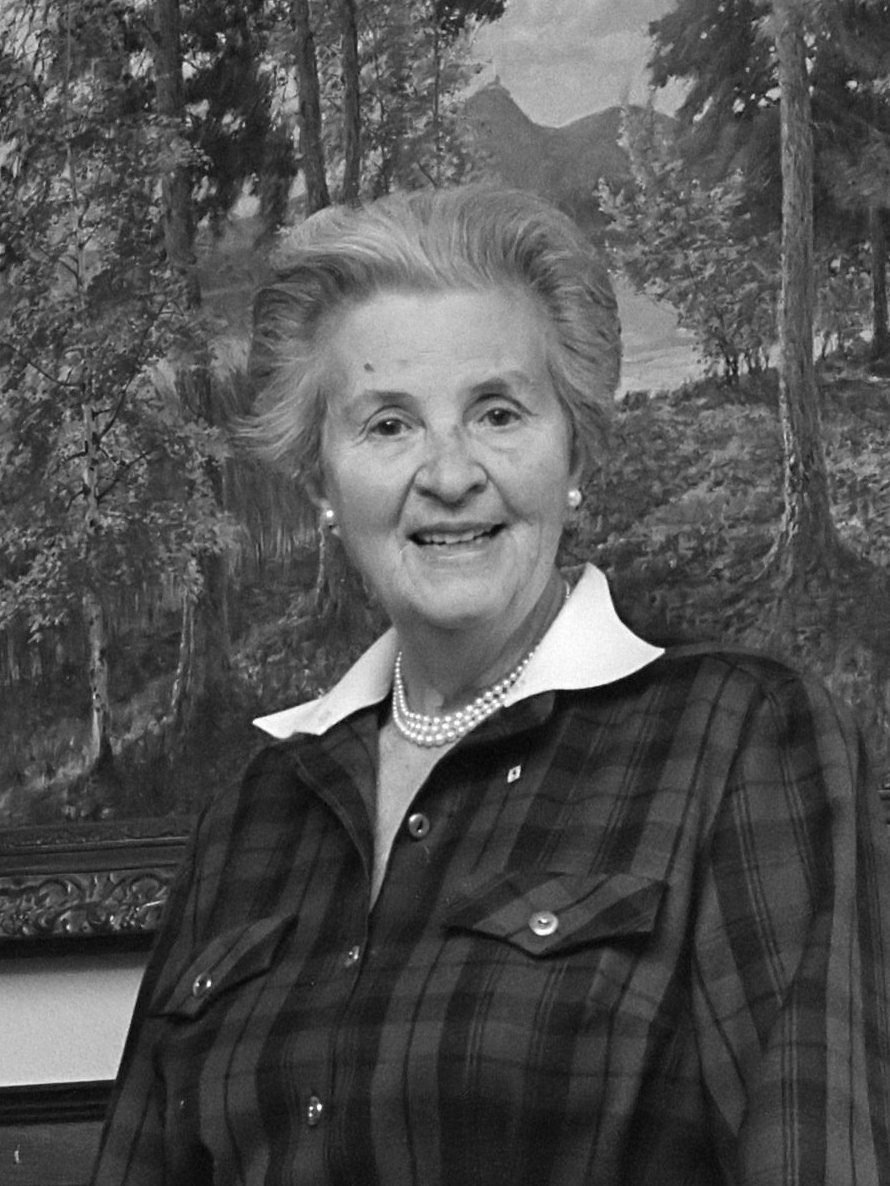 Opdracht Tubantia; mevrouw Gerth Pfeiffer met schilderij 26 november 1985